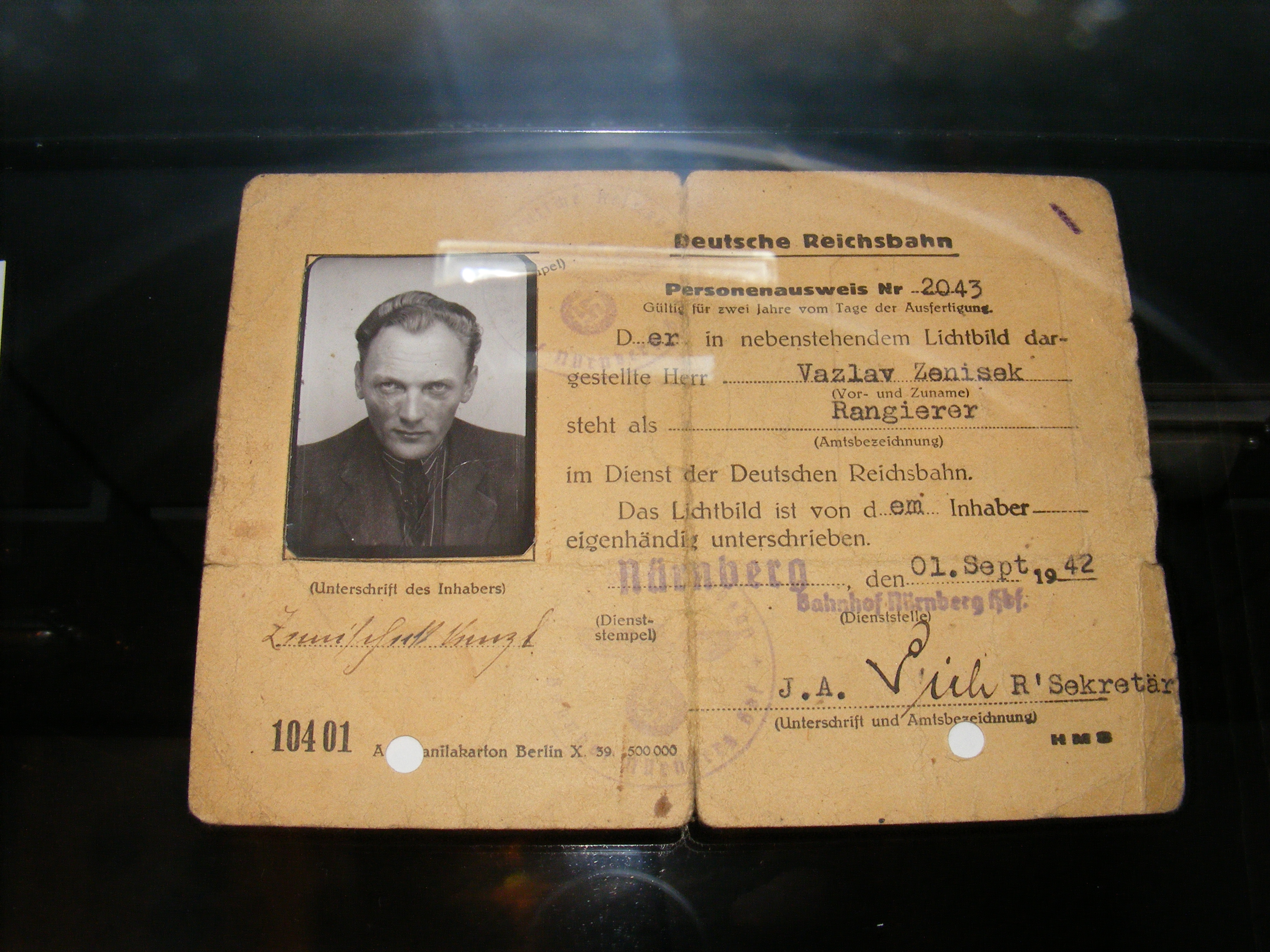 DB Museum Nürnberg - Arbeitsausweis eines Arbeiters aus dem Protektorat Böhmen und Mähren, der zur Reichsbahndirektion Nürnberg versetzt wurde (Deutsche Reichsbahn, 1942